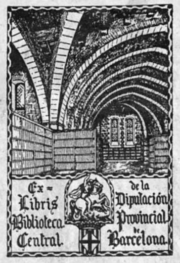 Ex Libris de una biblioteca de Barcelona